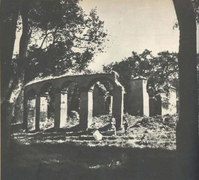 Kuskwam שרידי כנסייה דברה סהאהאי מריאם לפני שהוקמה מחדש